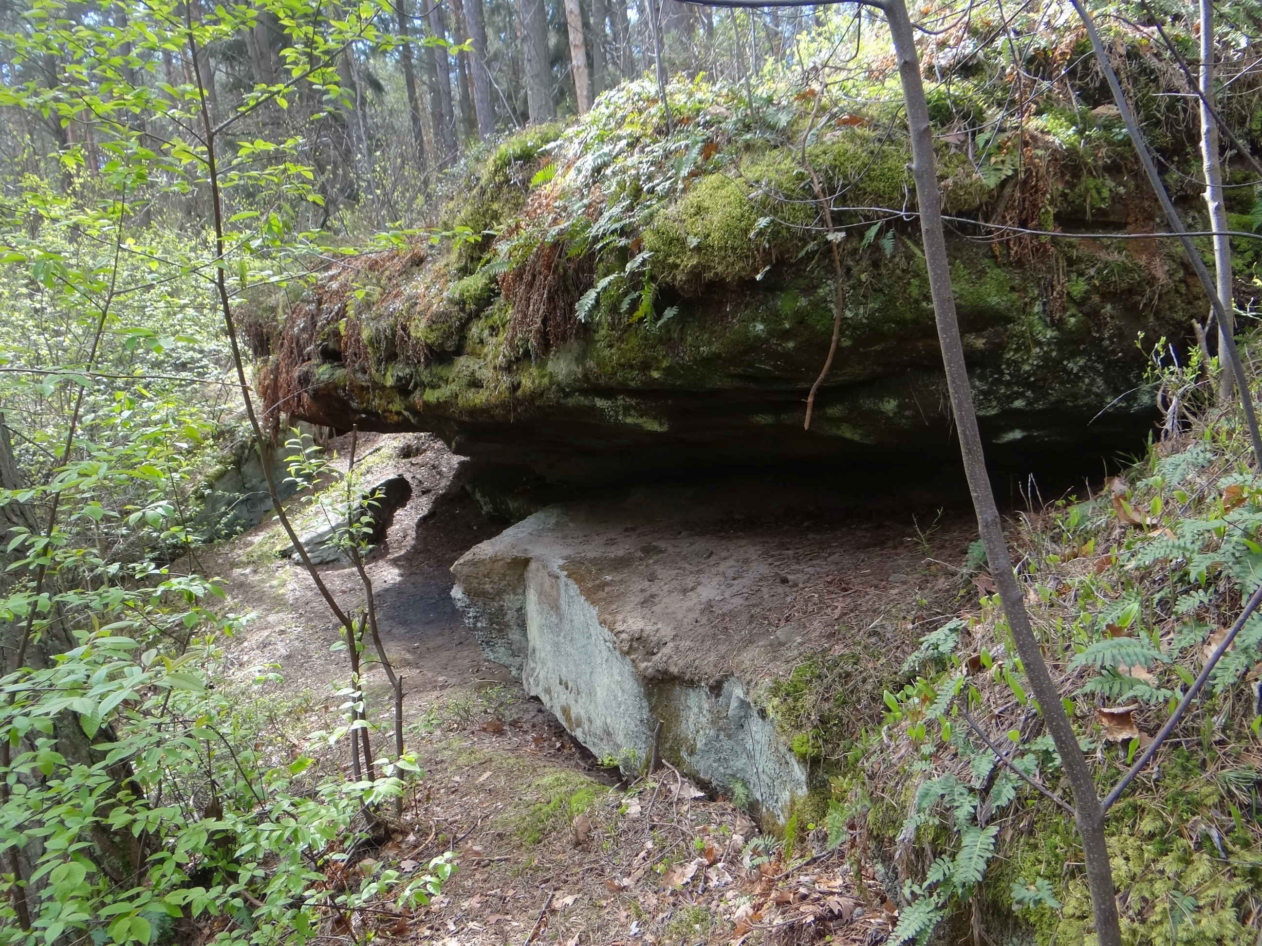 Rezerwat przyrody Skały w Krynkach